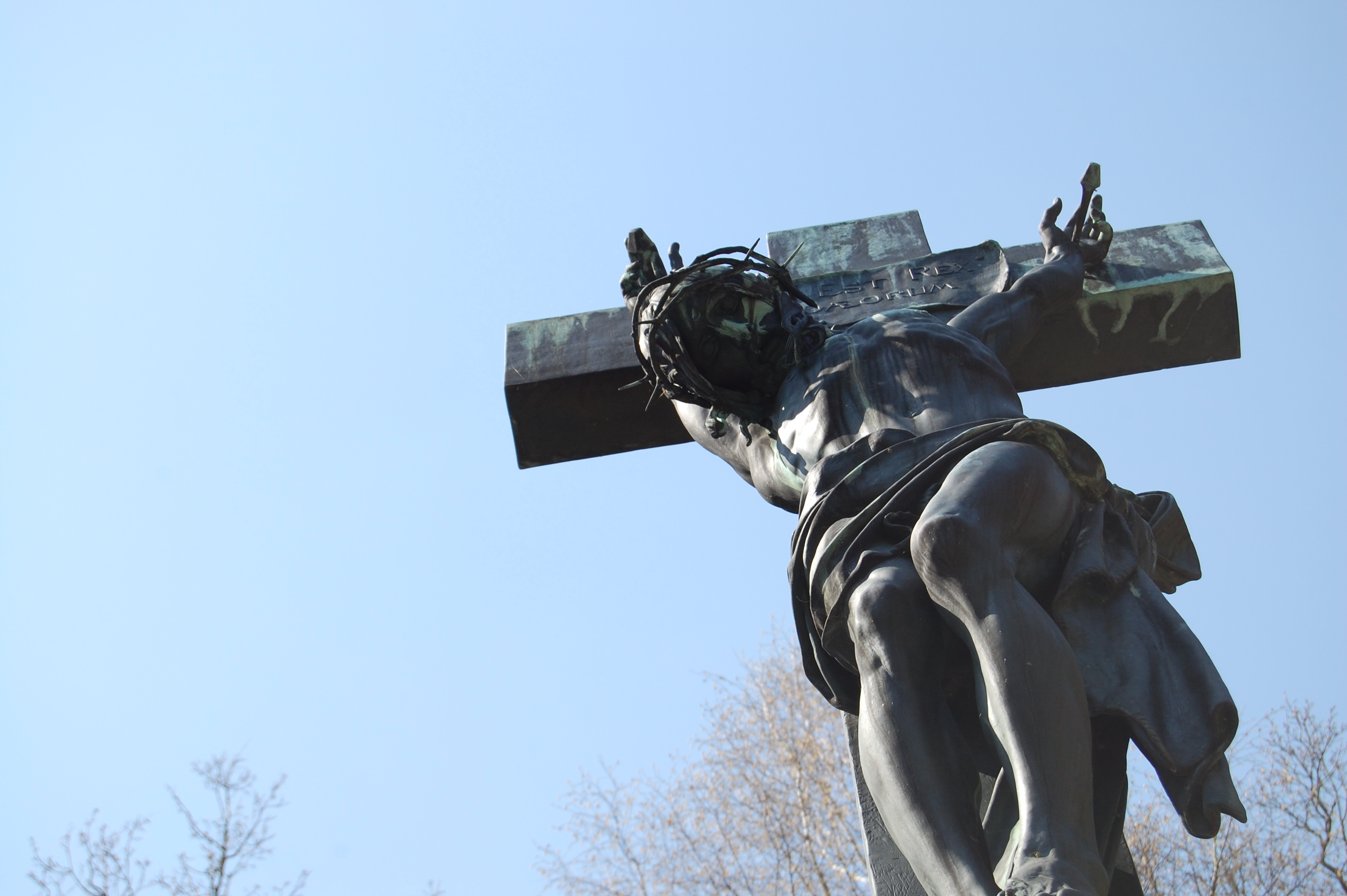 Pomník a hrobka Ringhofferů (Kamenice), Zaječí vrch, Kamenice